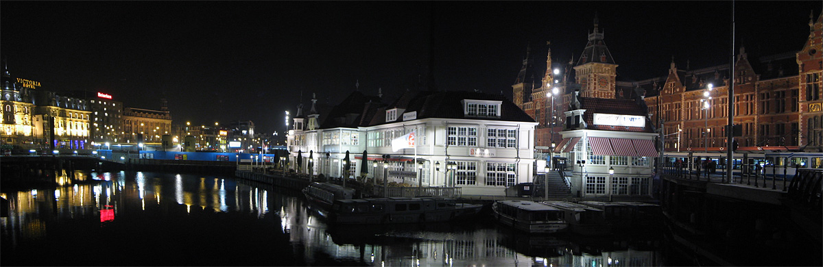 Amsterdam by night / Amsterdam noaptea.